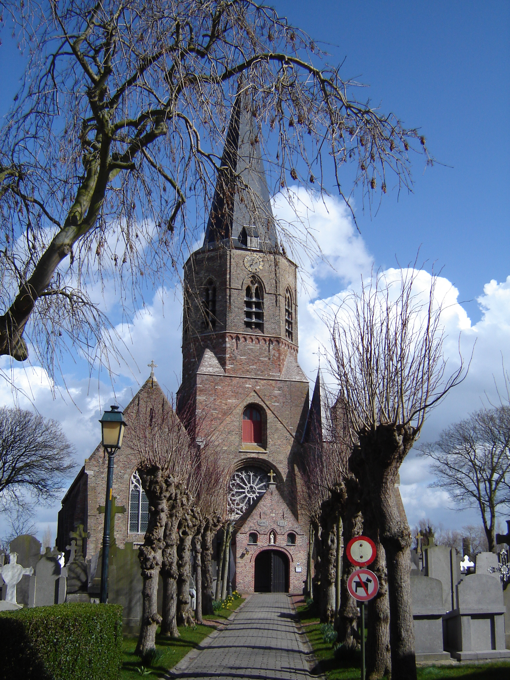 Sint-Clemenskerk in Klemskerke Church of Saint Clement in Klemskerke, De Haan, West Flanders, Belgium